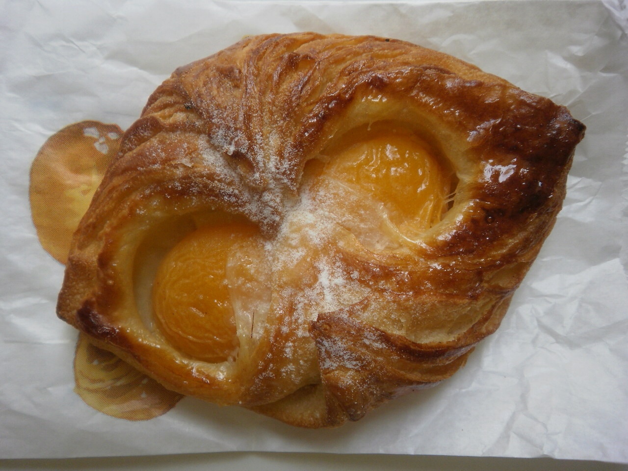 pâtisserie française appelée "oranais", ou parfois "lunette aux abricots", "croissant aux abricots", "abricotine"